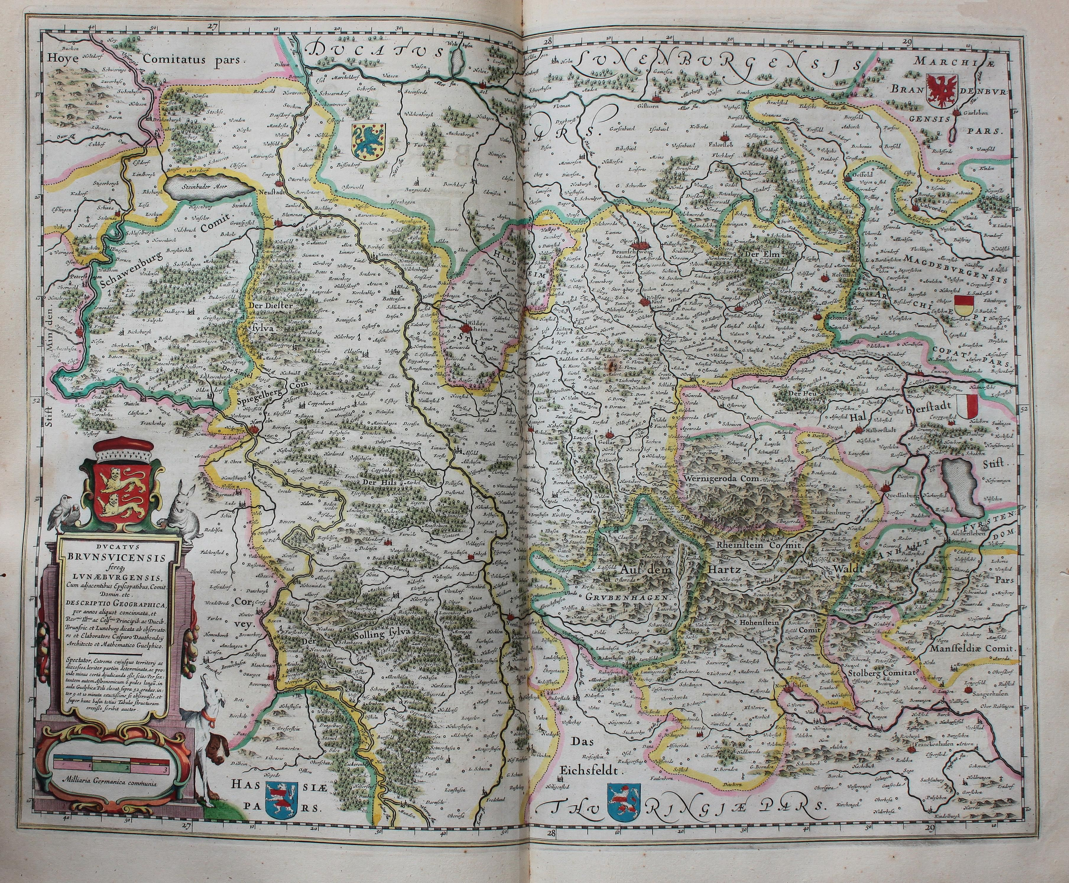 Descripción bibliográfica: Geographia Blaviana. - [Amsterdam : Juan Blaeu, 1659] . - [32], VI, 96 p., 34 f., h. 35a, 35b, 35c, 35d, 36-44 f., 34, [2], 36-40, [2], 43-70 [i. e. 75], [1] f., [20] p. de map., [9] f. de map., [4] f. pleg. de map., [2] f. de plan., [2] f. ge grab. : |bil. ; |cFol. marca major (57 cm.) . - En la dedicatoria a Felipe IV: "Presenta ... El Atlas Universal y Cosmographico de los orbes y terrestre ... Juan Blaeu" . - Título tomado del frontispicio. -- Privilegio fechado en 1659. -Errores de pag. - Sign.: 1, *2, **3, ***-****2, a-e2, A-I2, K1, L-Z2, Aa-Dd2, 4 2, Ee-Ff2, A-I2, K1, L2, M1, N-Y2, Z5, Aa-Dd2, Ee1, A-D2, E-F1, G-I2, K-L1, M-O2, P1, Q-Z2, Aa-Bb2, Cc1, Dd3, Ff-Zz2, Aaa-Bbb2, . - Frontispicio grab. col. -- Incluye un total de 49 il. entre map., plan. i grab. Materia: Atlas - Obras anteriores a 1800 Impresor: Blaeu, Joan, 1596-1673, imp. Lugar de impresión: Holanda. Amsterdam Localización: Vea la ilustración en su contexto Visite también la exposición "Cartografía histórica en la Biblioteca de la Universidad de Sevilla"